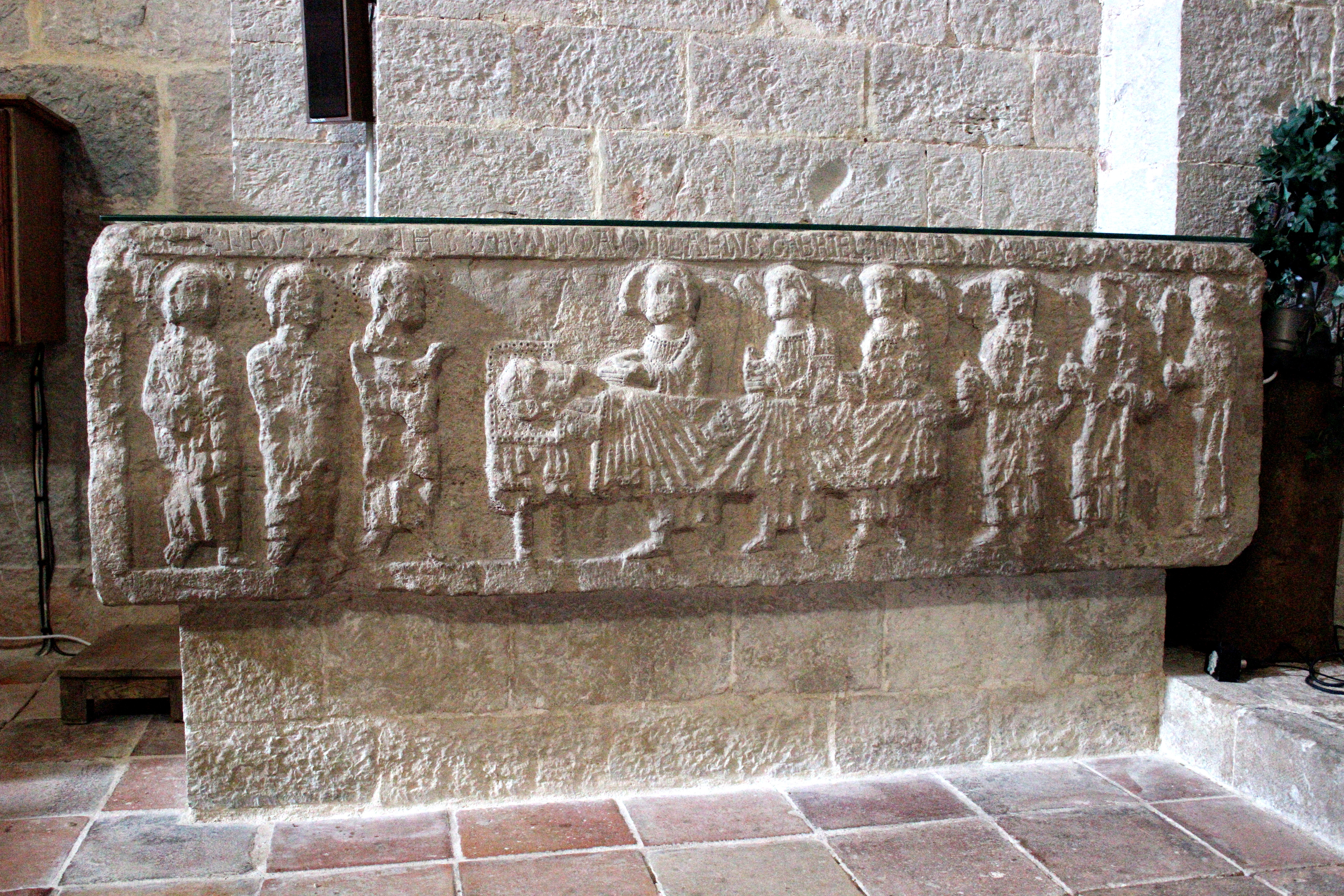 Abbaye de La Celle, département du Var, France. Sarcophage dit tombe de Gersende de Sabran, comtesse de Provence (morte après 1225)